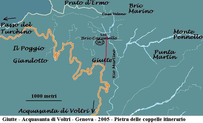 Giutte Acquasanta Voltri - 2005 - Pietra coppelle ubicazione